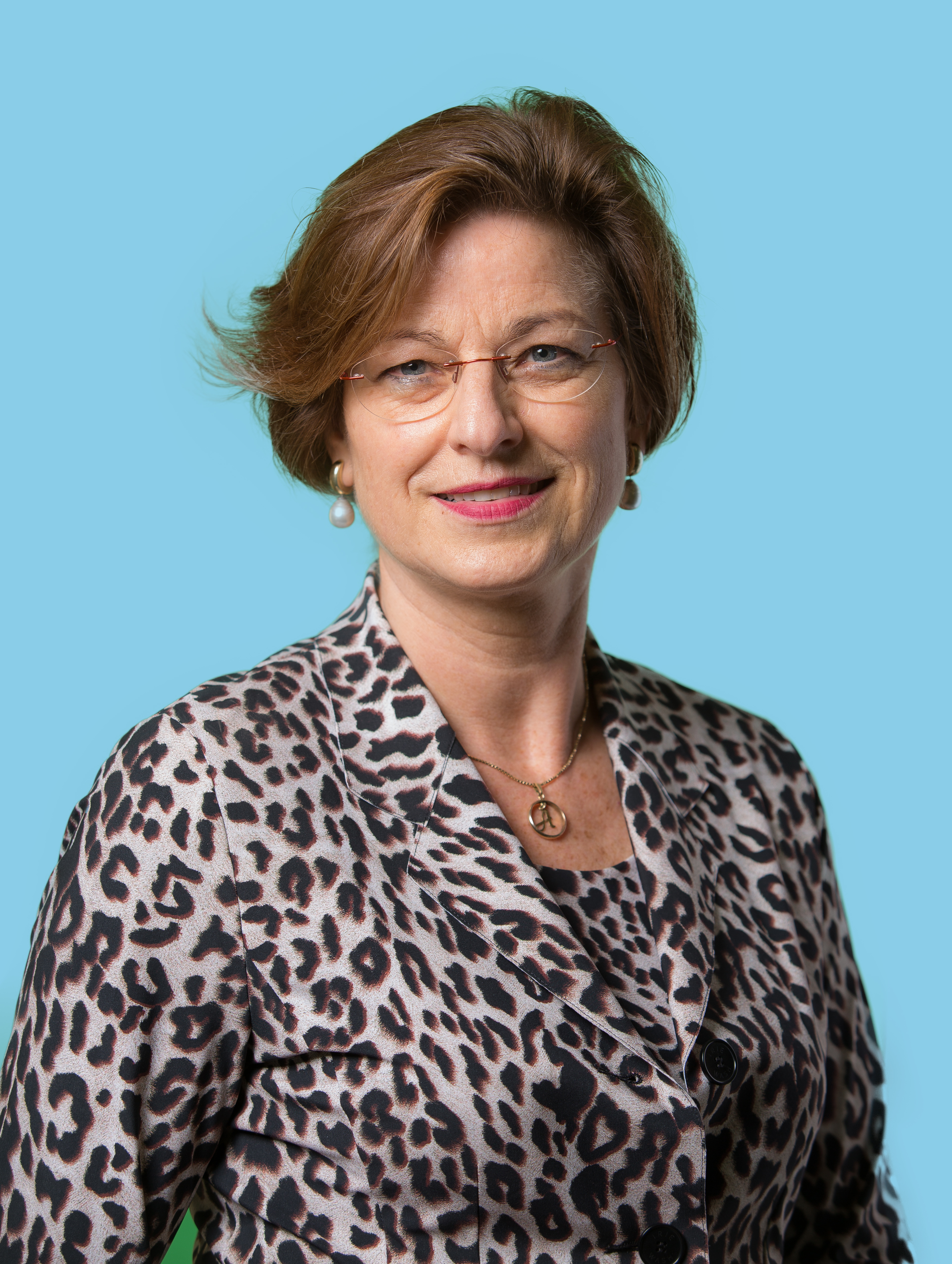 22 november 2016. Tweede Kamerlid voor de Partij van de Arbeid. Foto: Lex Draijer.